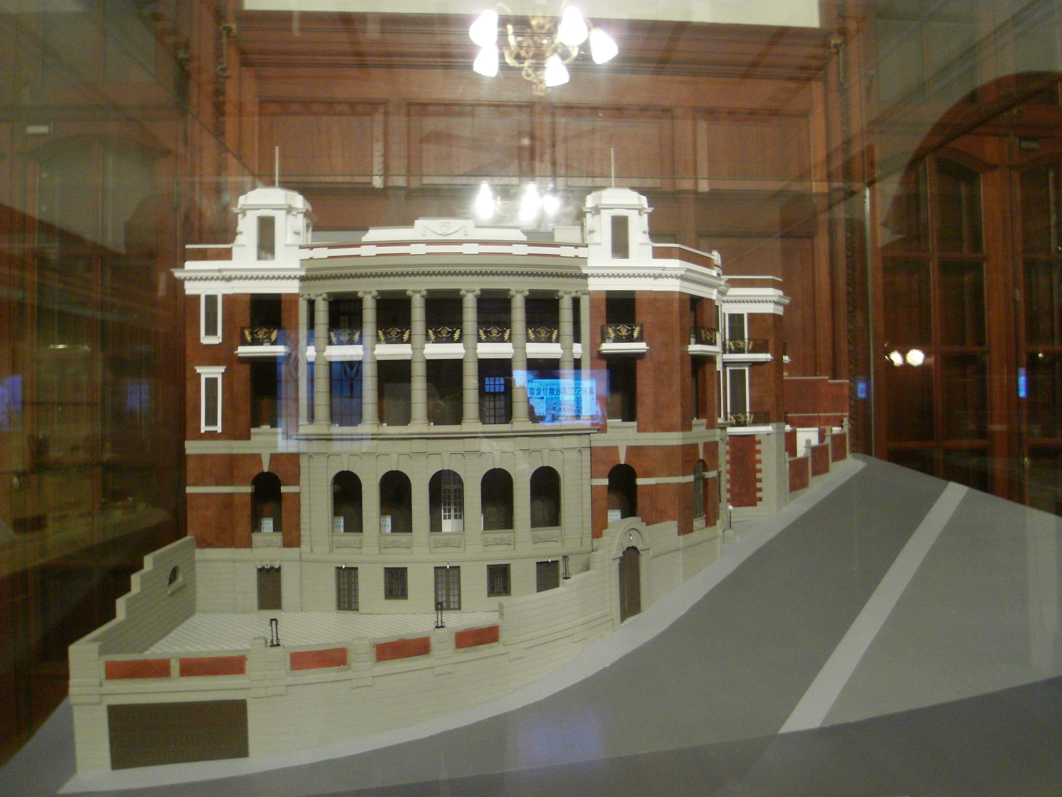 中文（香港）: 甘棠第之模型,孫中山紀念館,香港